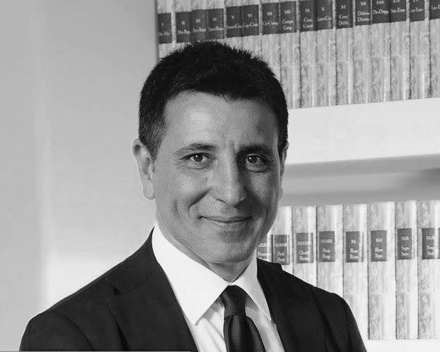 Vincenzo Imperatore